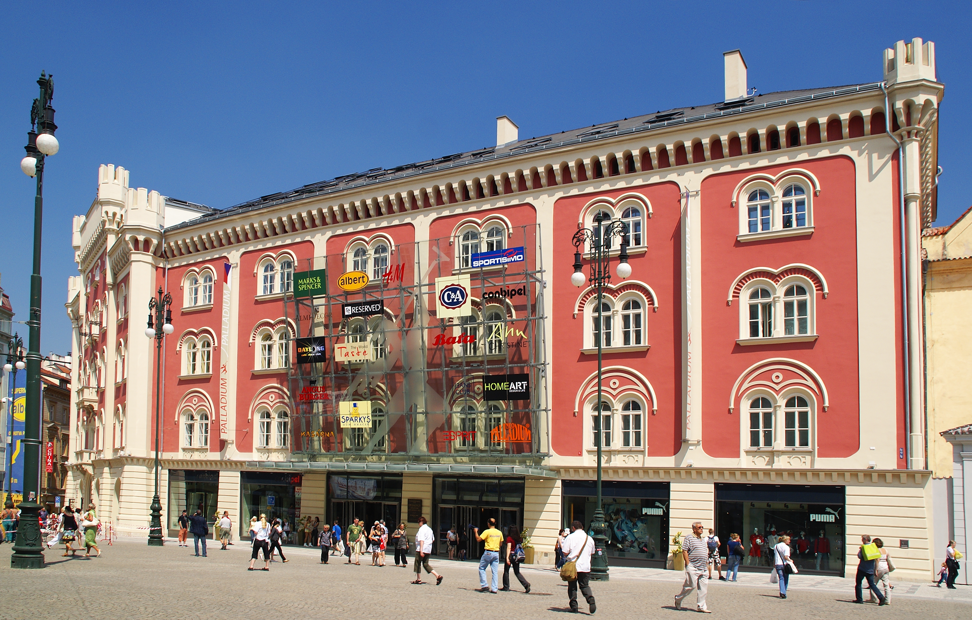 Obchodní centrum Palladium (dříve kasárna Jiřího z Poděbrad)